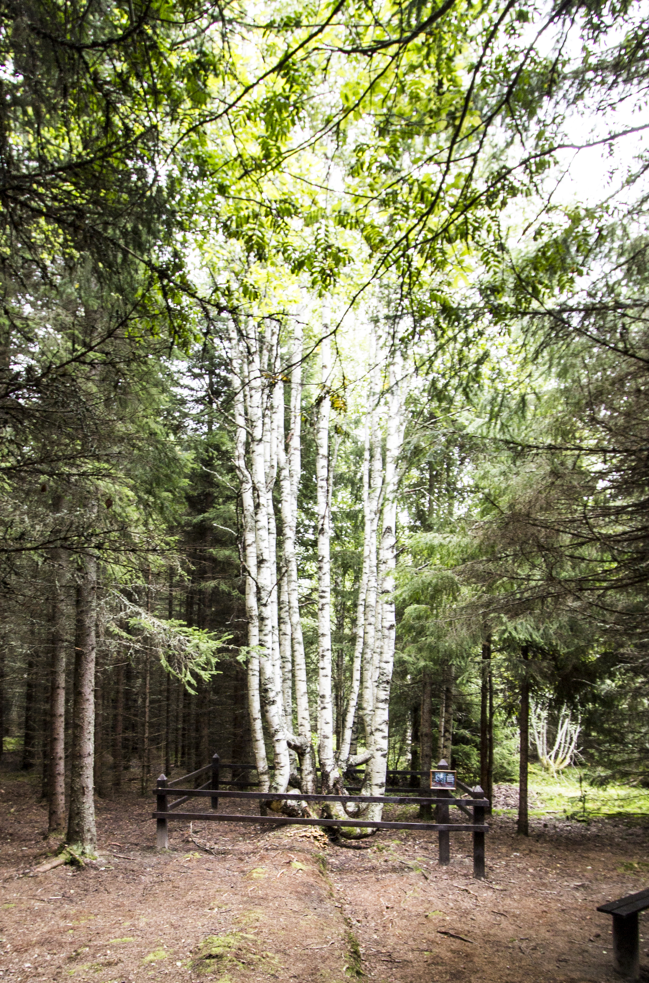 Двенадцати ствольная береза - "Двенадцать апостолов"